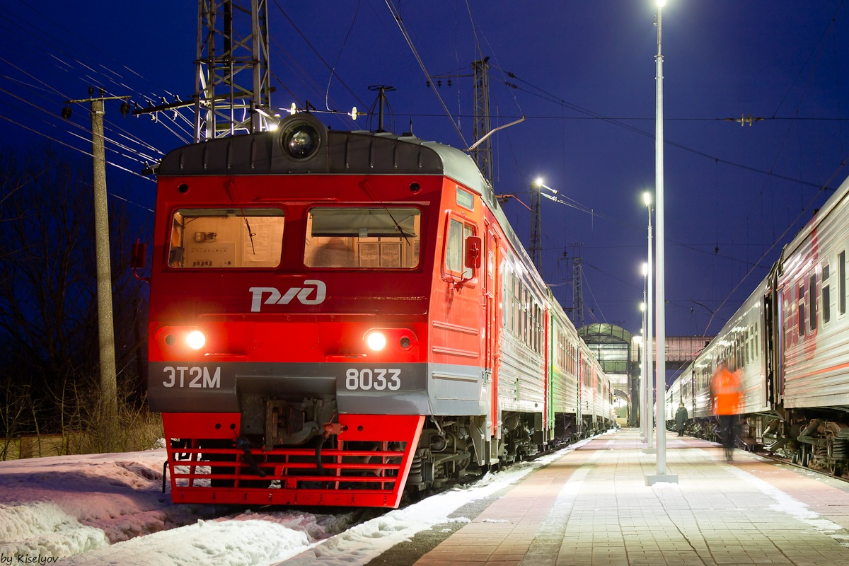 Дополнительные головные вагоны ЭТ2М-803301 и ЭТ2М-803309 Эксплуатация: с 2005 года в ТЧ-10 ОКТ Санкт-Петербург-Московское (Металлострой) КР-1 Московский ЛРЗ 09.2016 г.